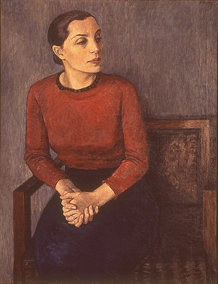 Bildnis der Schauspielerin Lotte Loebinger / Frau im Lehnstuhl (Lotte Loebinger), entstanden in Moskau 1936; Berlin, Staatliche Museen zu Berlin - Preußischer Kulturbesitz, Nationalgalerie